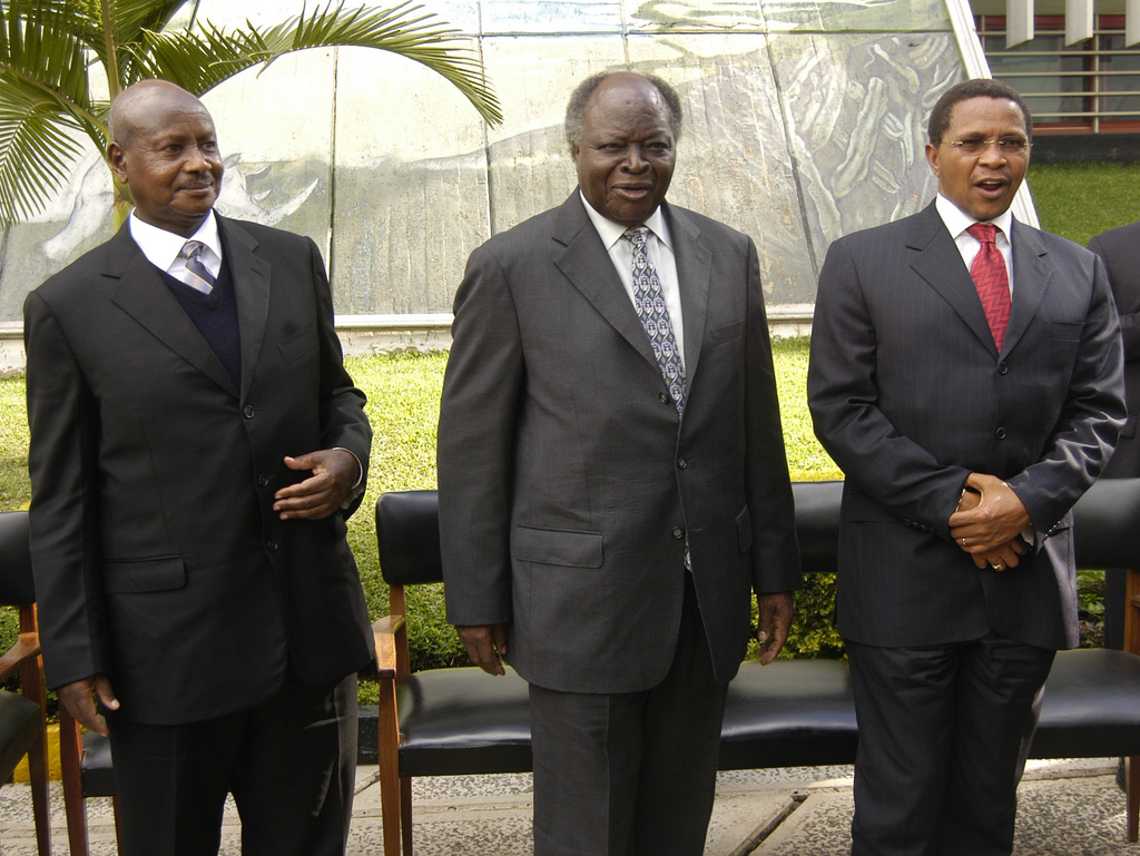 Ugandan President Yoweri Museveni, Kenyan President Mwai Kibaki and Tanzanian president Jakaya Kikwete during the 8th EAC summit in Arusha.